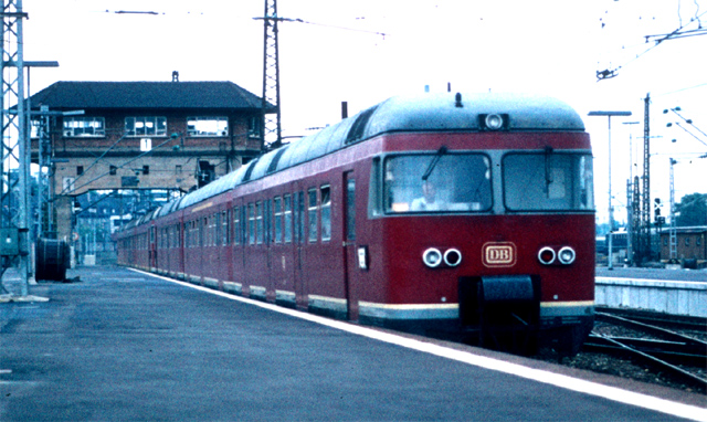 Deutsche Bahn (DB) trein ET 27 in 1974 te Stuttgart